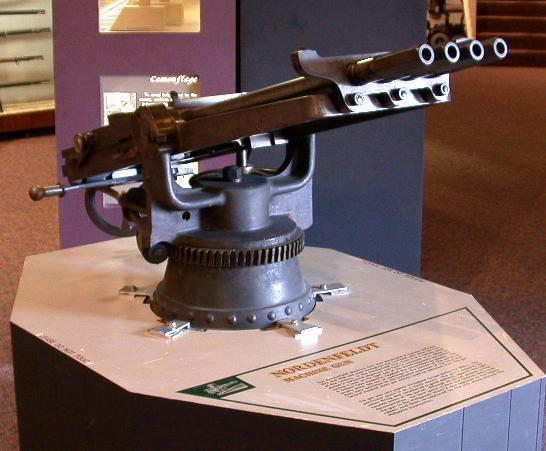 A Nordenfelt gun at United States Army Ordnance Museum, Aberdeen Proving Grounds MD USA.